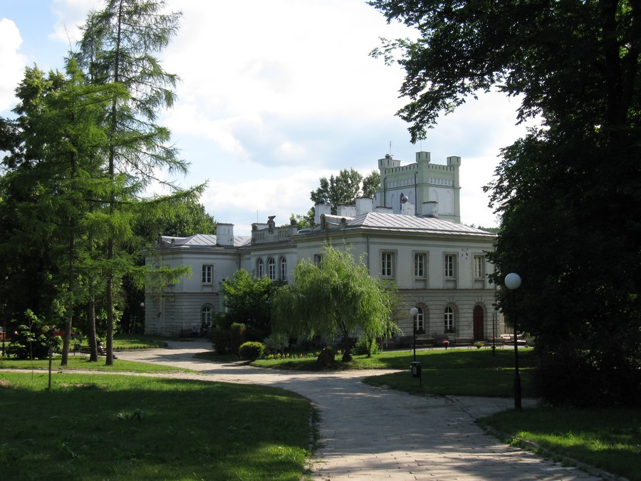 Pałac w Celejowie